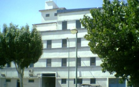 Fábricas Lusitana no Centro de Alcains